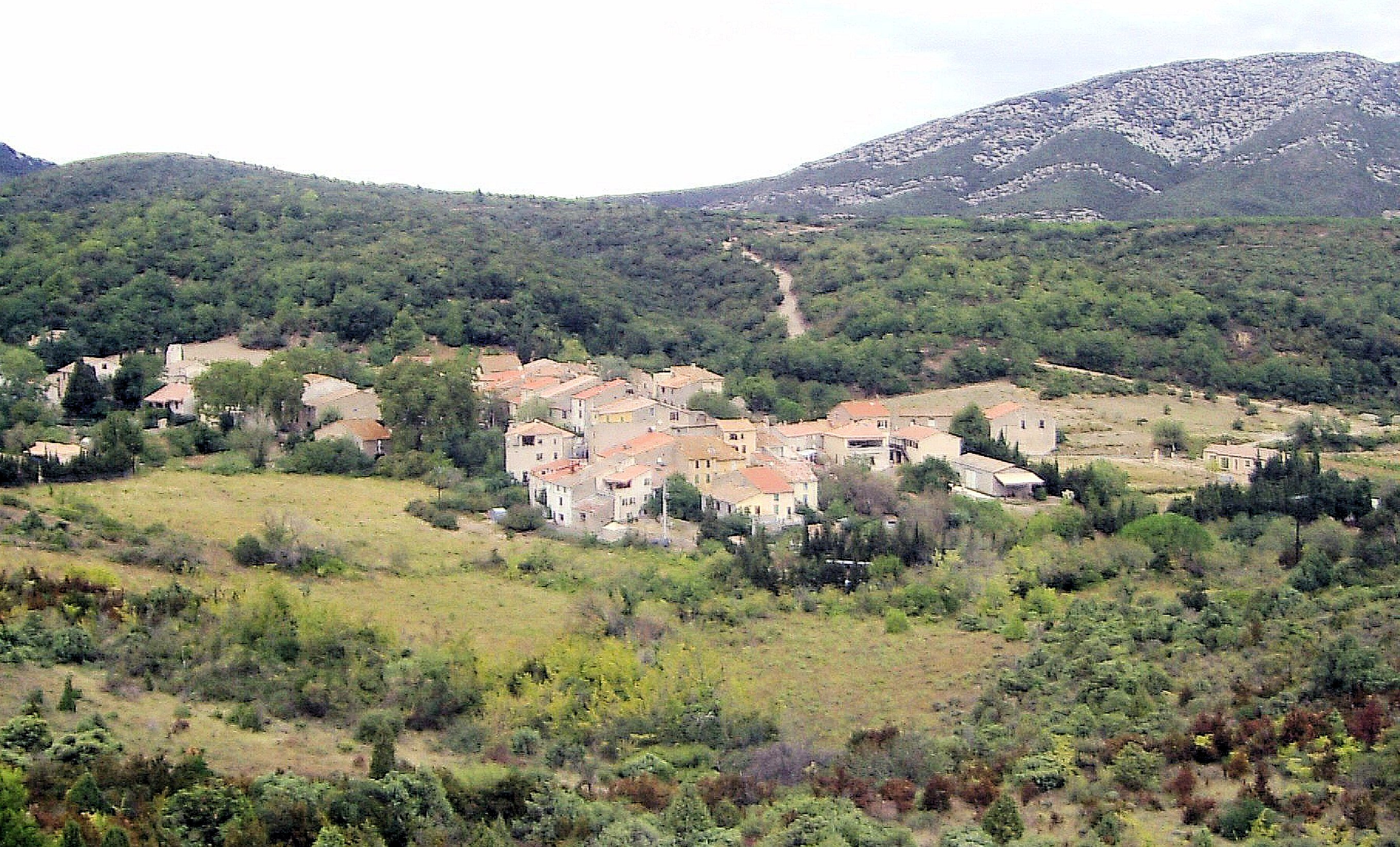 Vue depuis le sud-est sur Feuilla